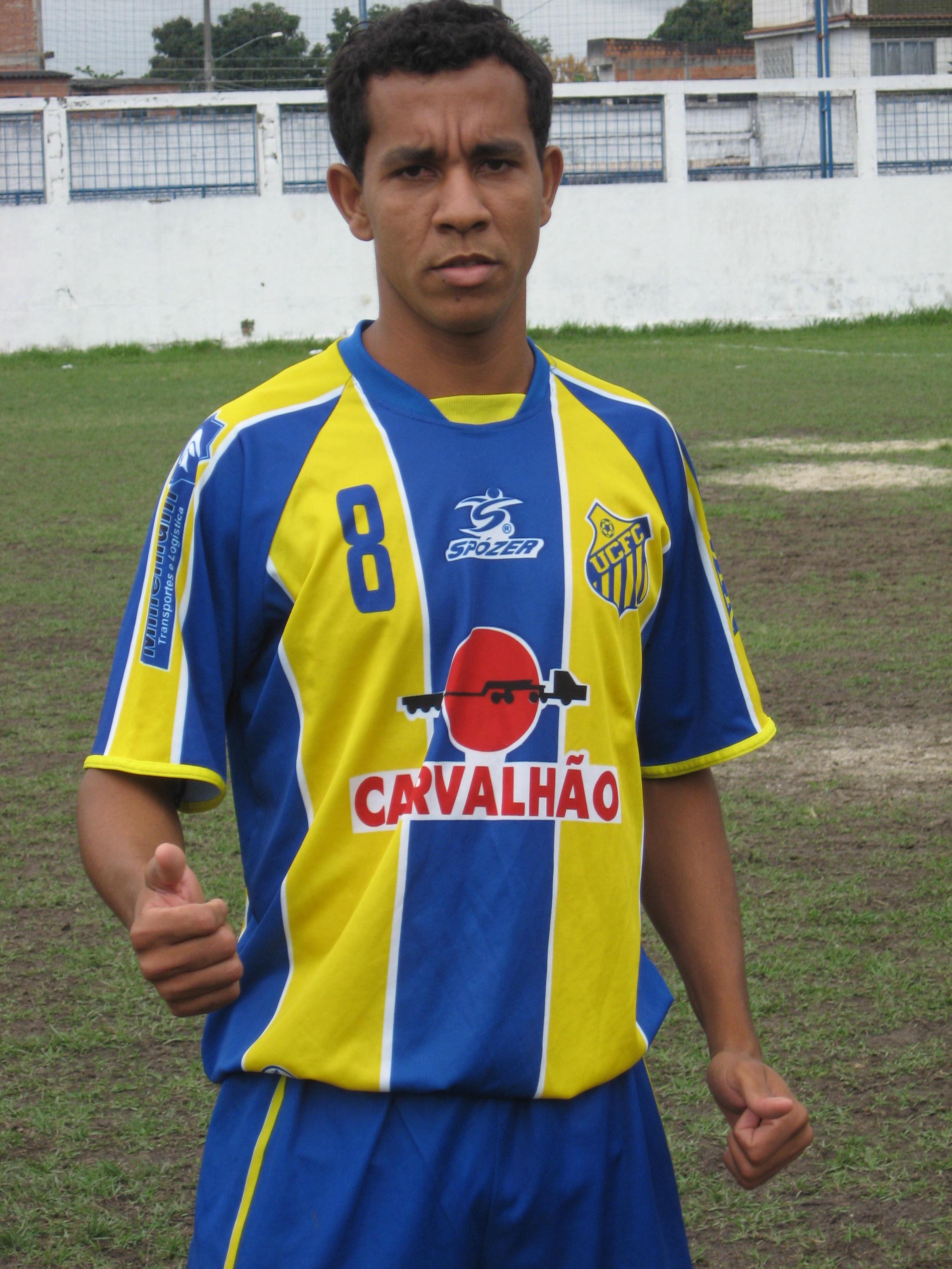 Atleta do União Central Futebol Clube